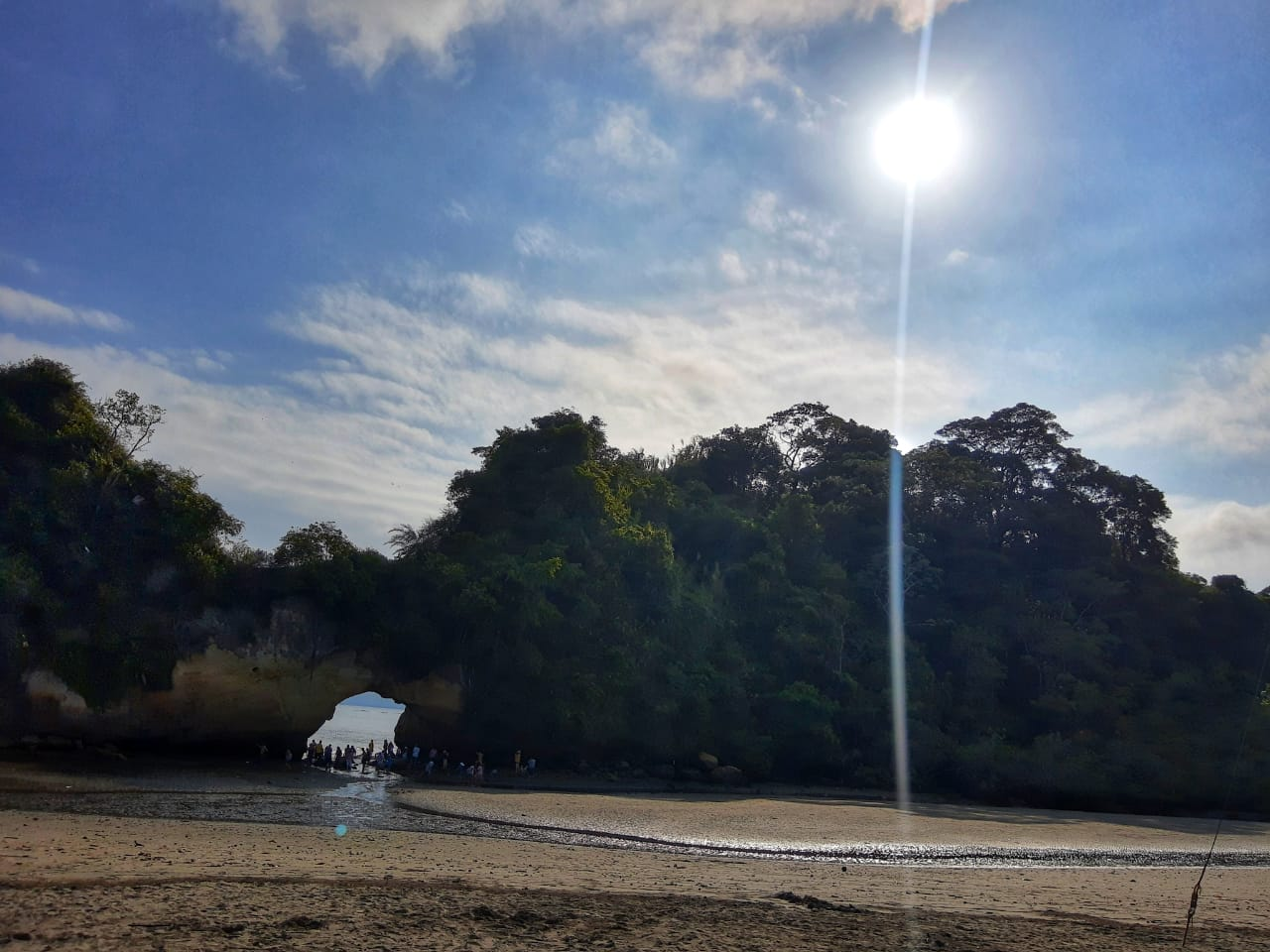 El arco del Morro es uno de los sitios más hermosos de Tumaco,un atractivo natural consistente en un arco de piedra forjado por la fuerza del agua que lo rodean.